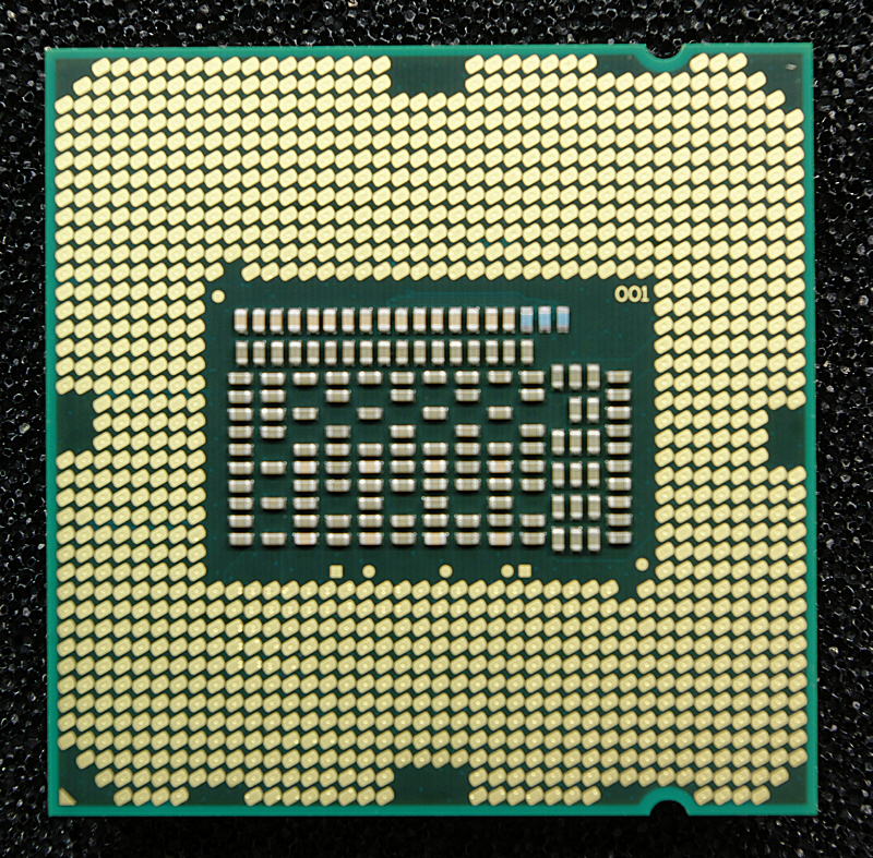 Unterseite Socket 1155 cpu